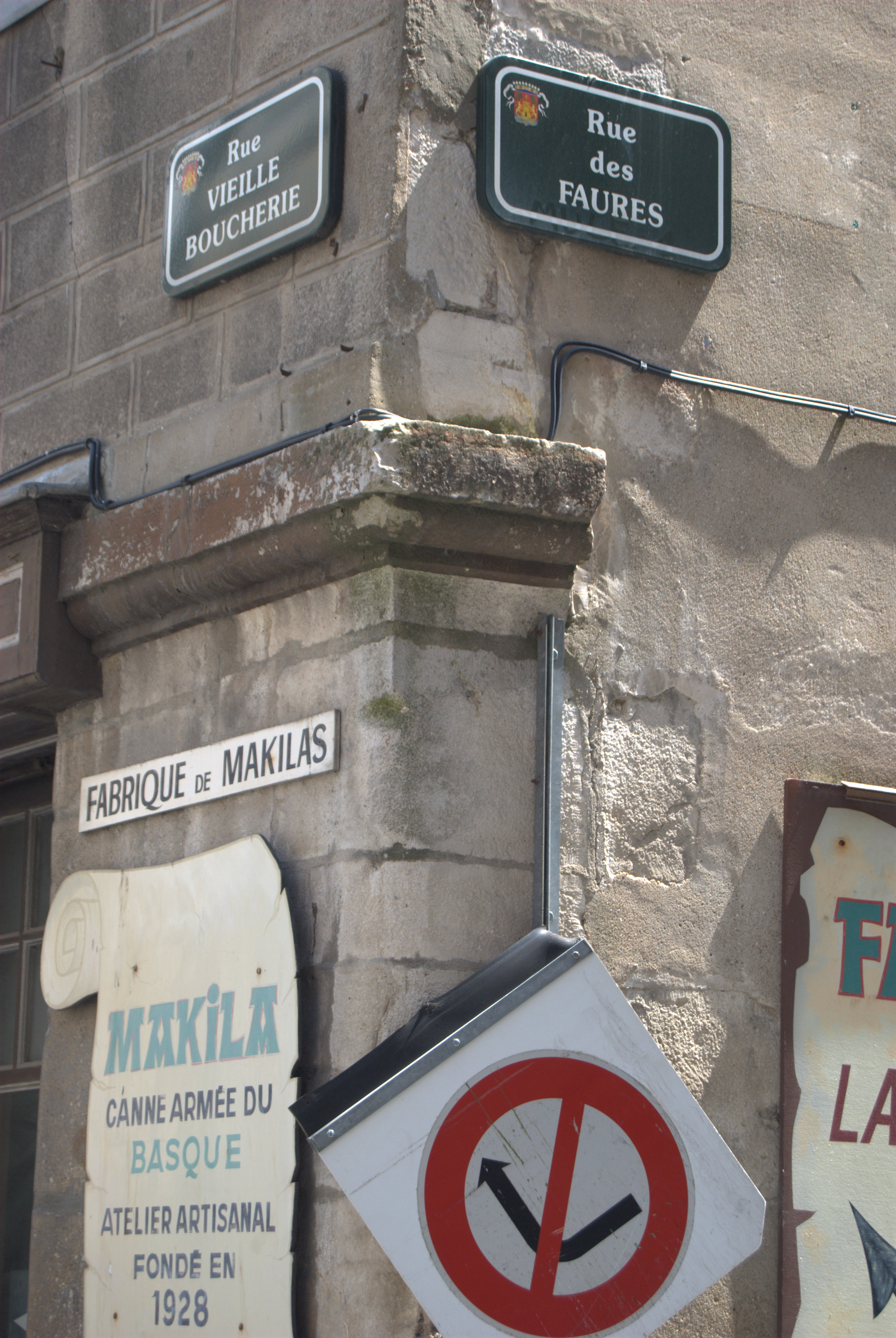 Panneaux de signalisation, des rues des Faures et Vieille-Boucherie, d'une fabrique de makilas.